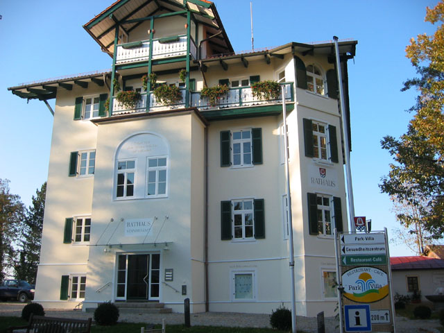 Bad Heilbrunner Rathaus